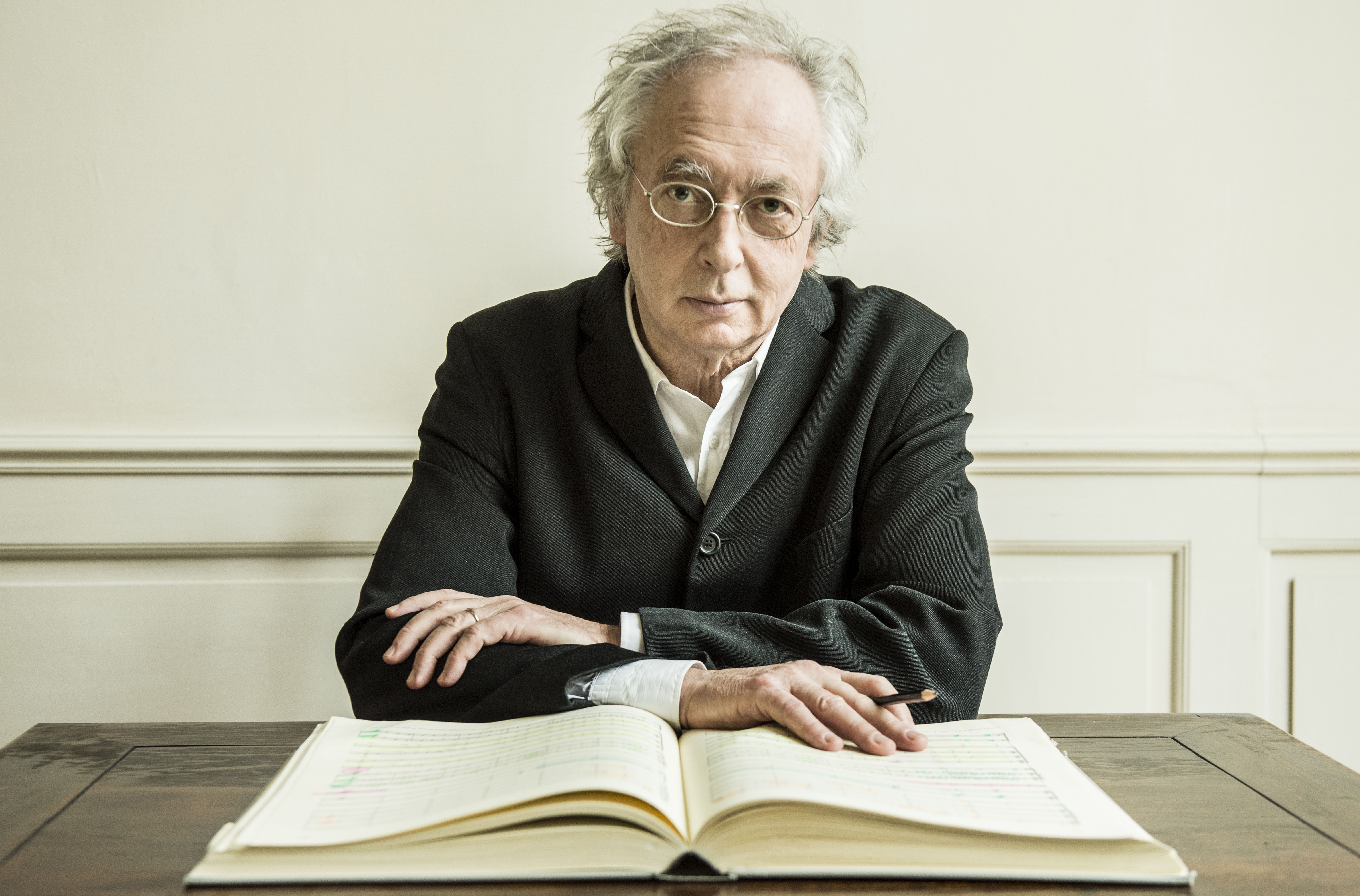 Philippe Herreweghe, Belgisch koorleider en dirigent.